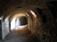 Podzemlje Petrovaradinske tvrđave